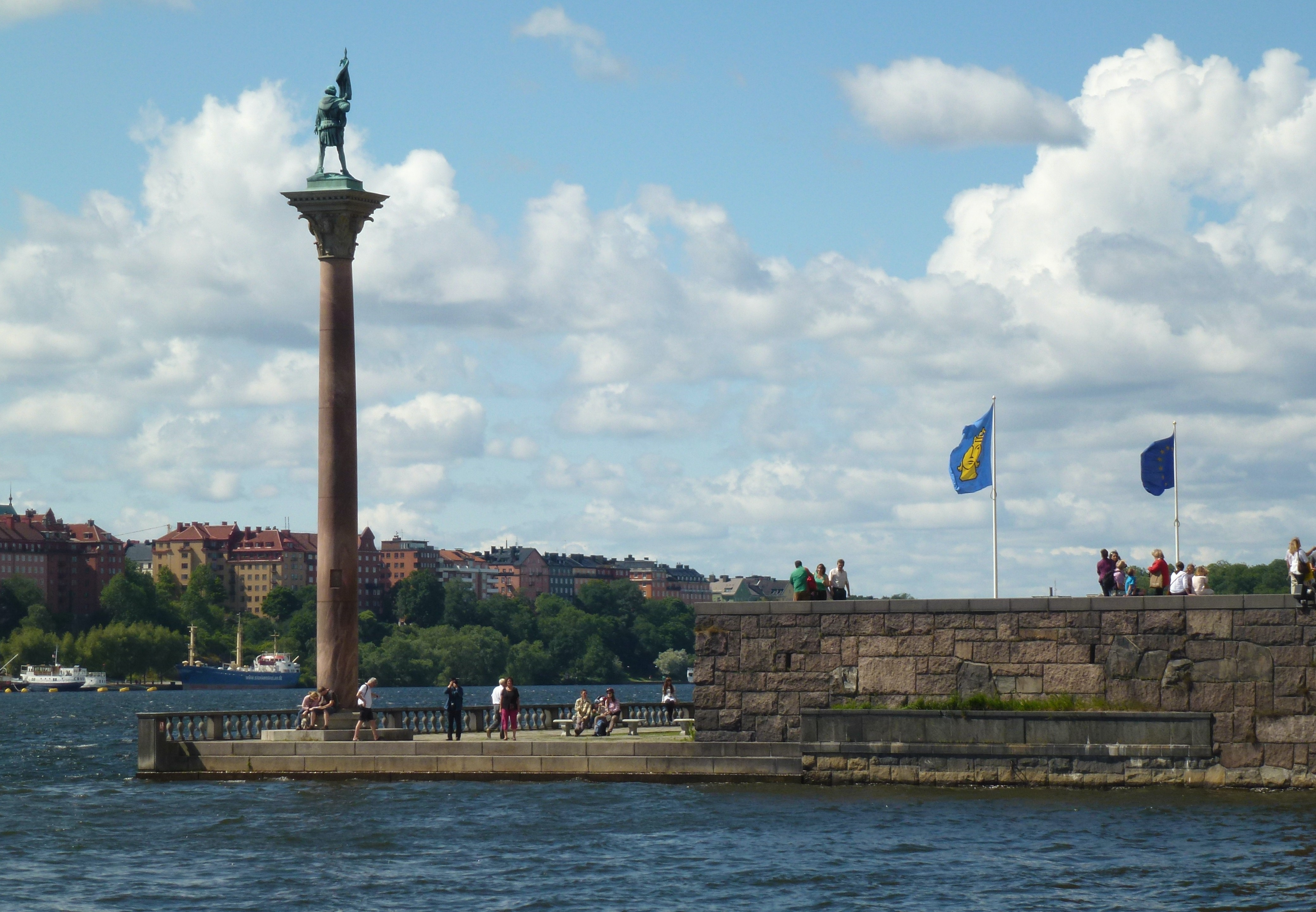 Engelbrektstatyn